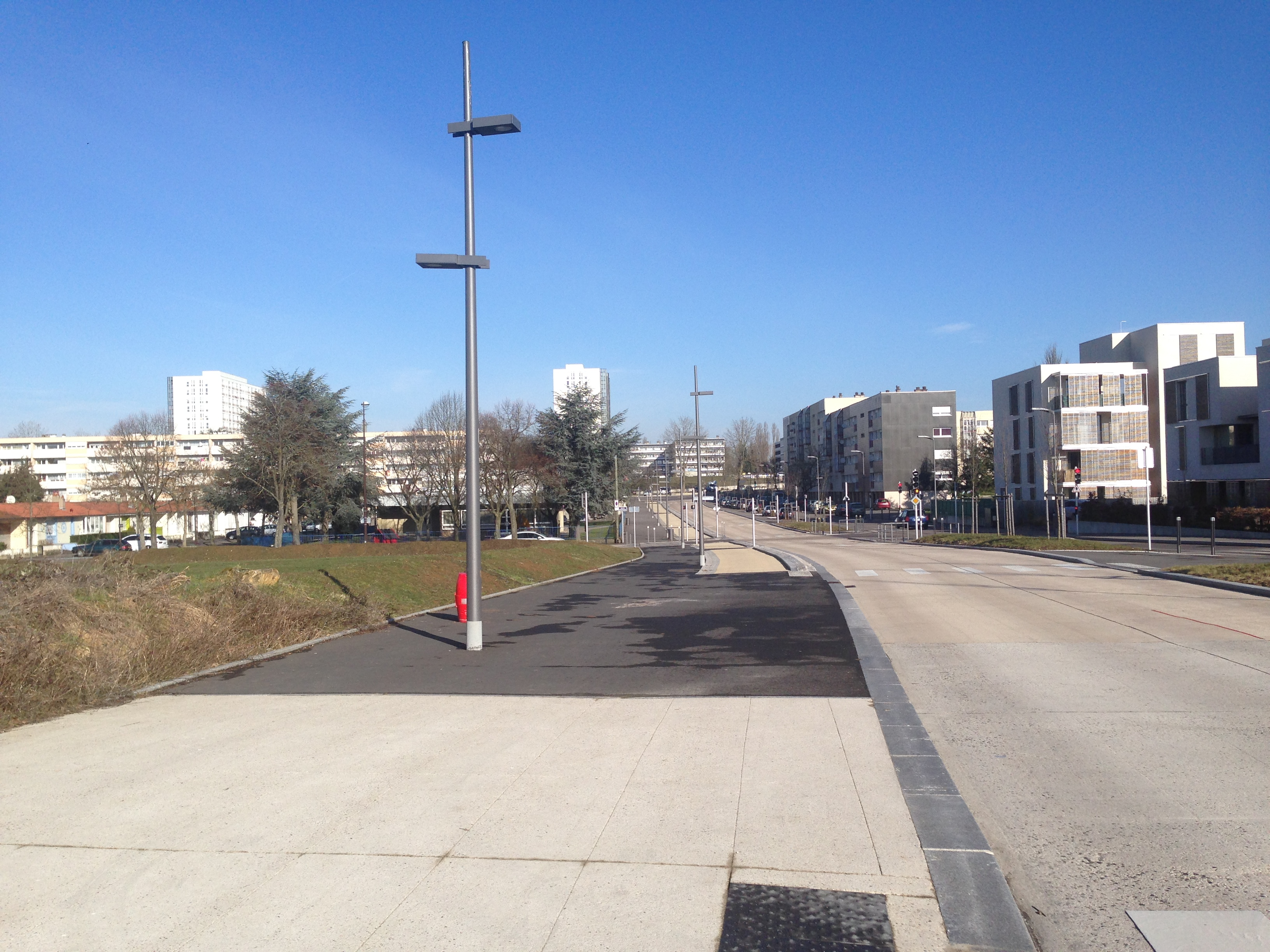 Quartier Borny de Metz